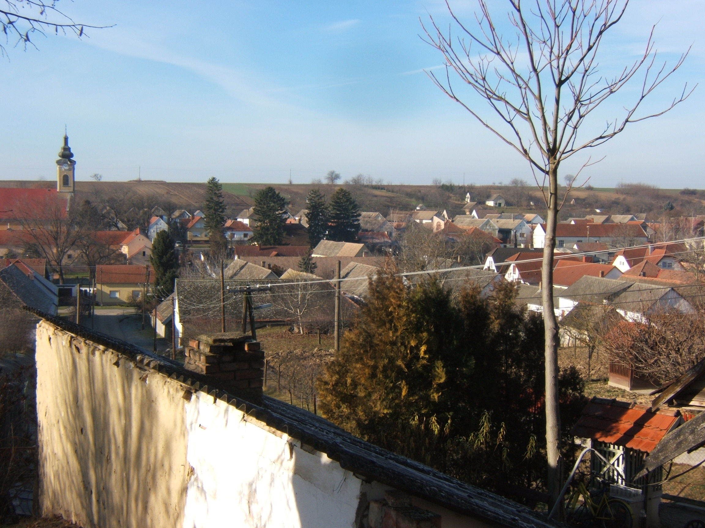 Palotabozsok, a falu látképe a kálváriától